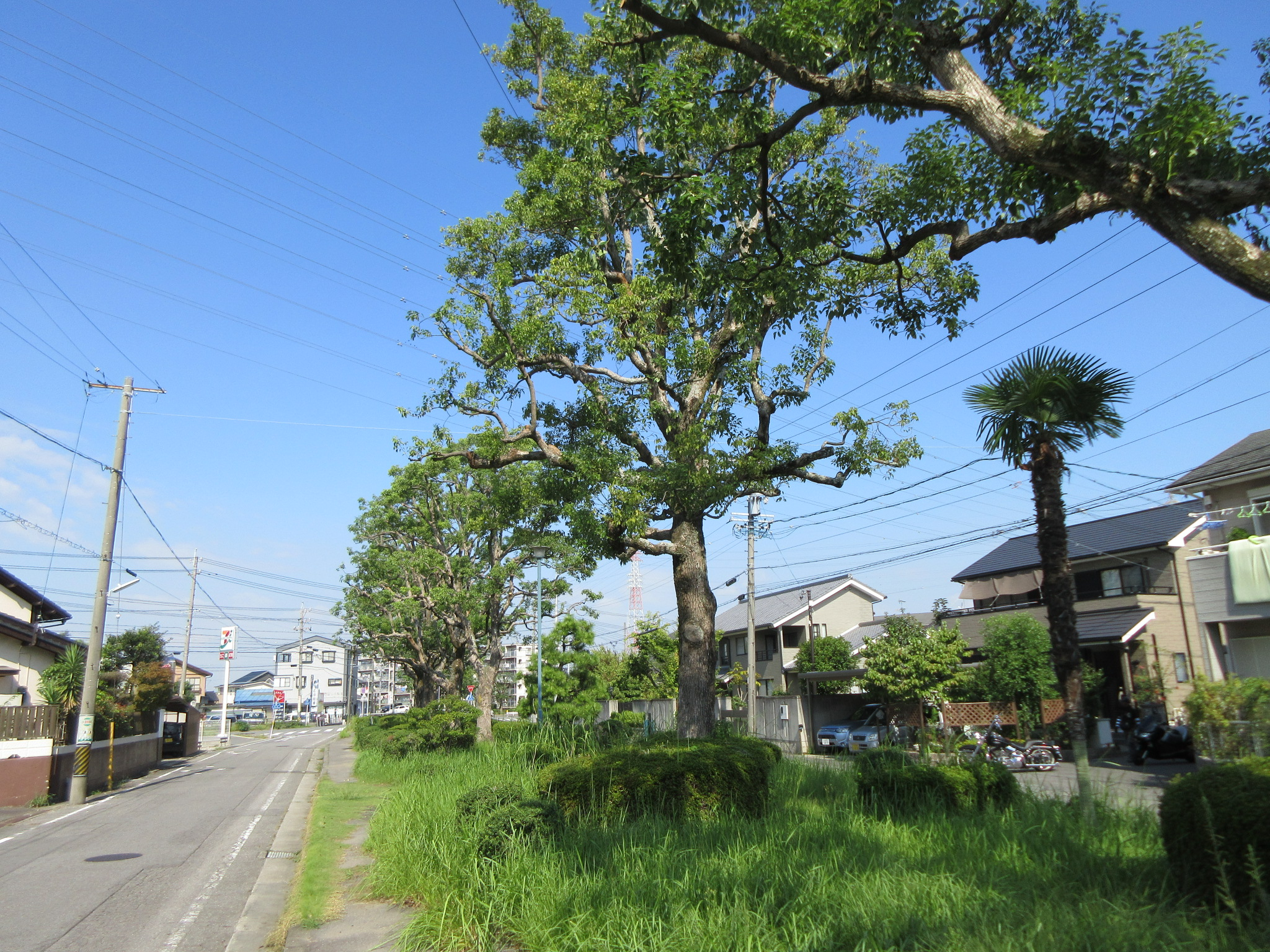 明治川緑道（岡崎市日名南町にて撮影）